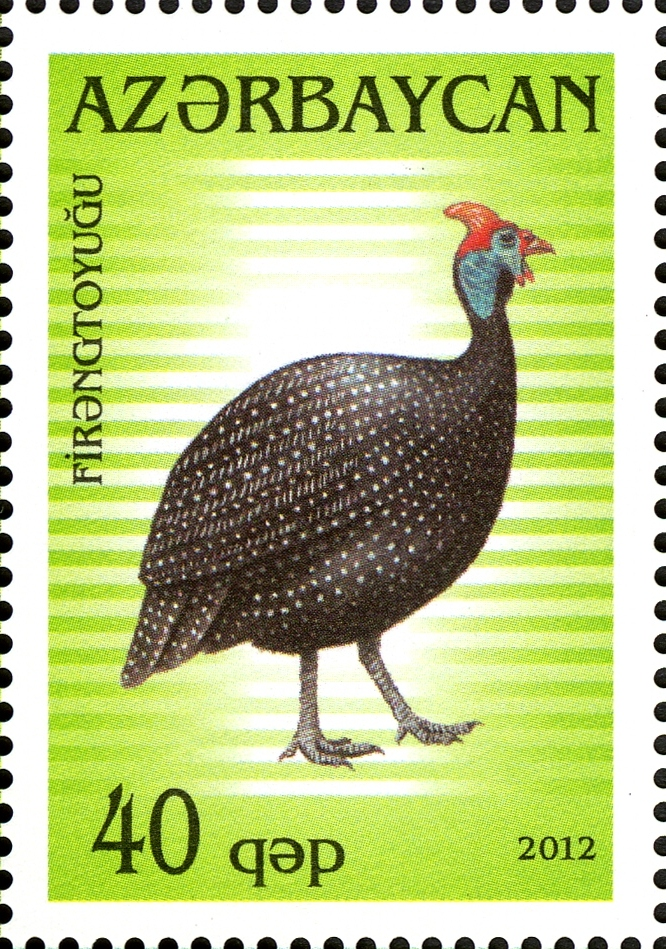 Ev quşları: firəngtoyuğu